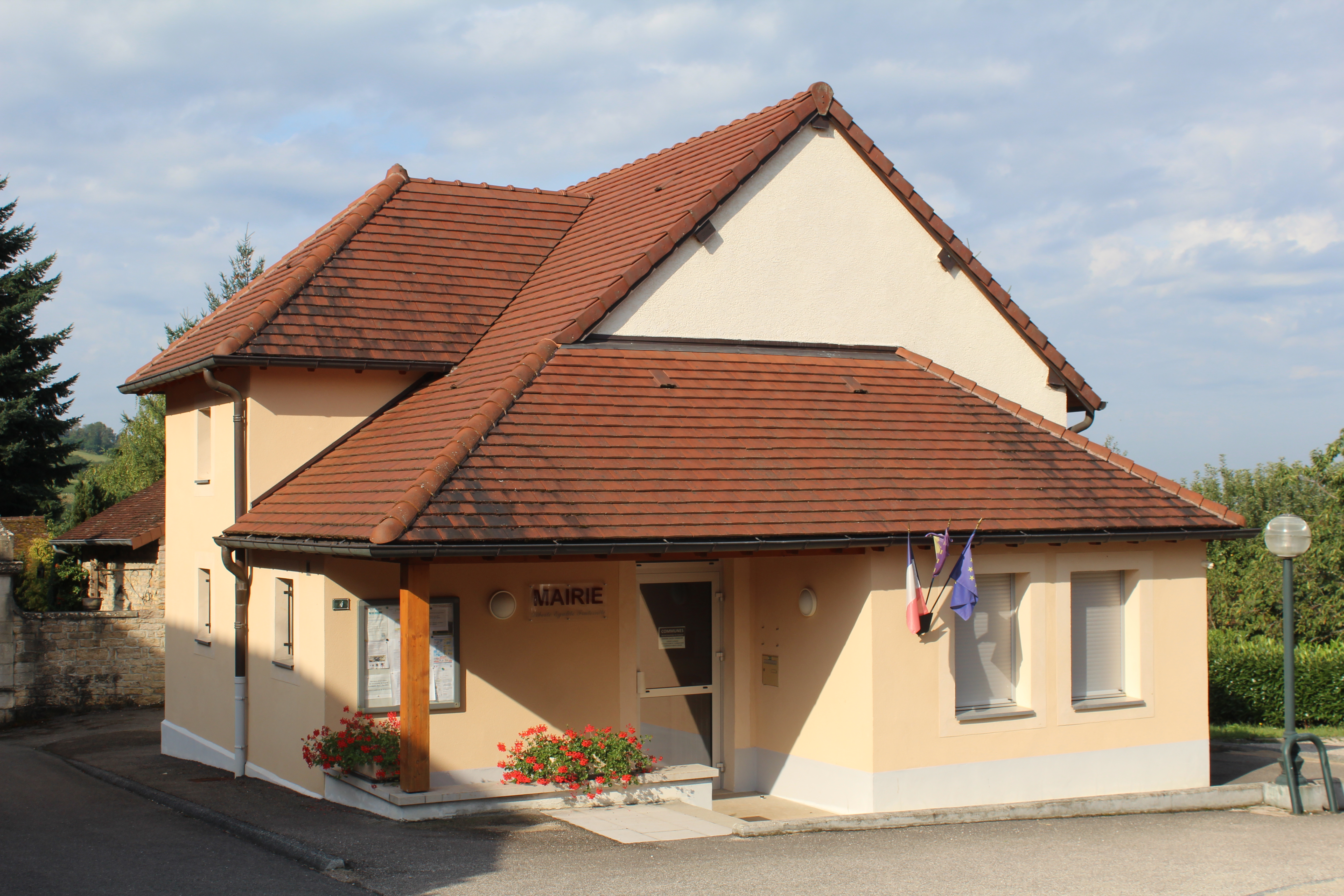 Mairie de Rotalier.